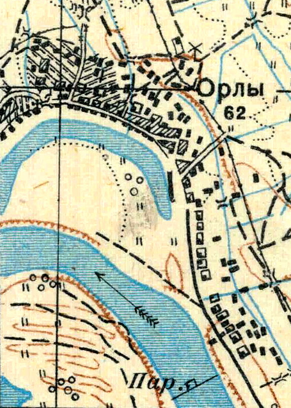 Топографическая карта Ленинградской области, квадрат О-35-21-Г-а (Орлы), деревня Орлы.